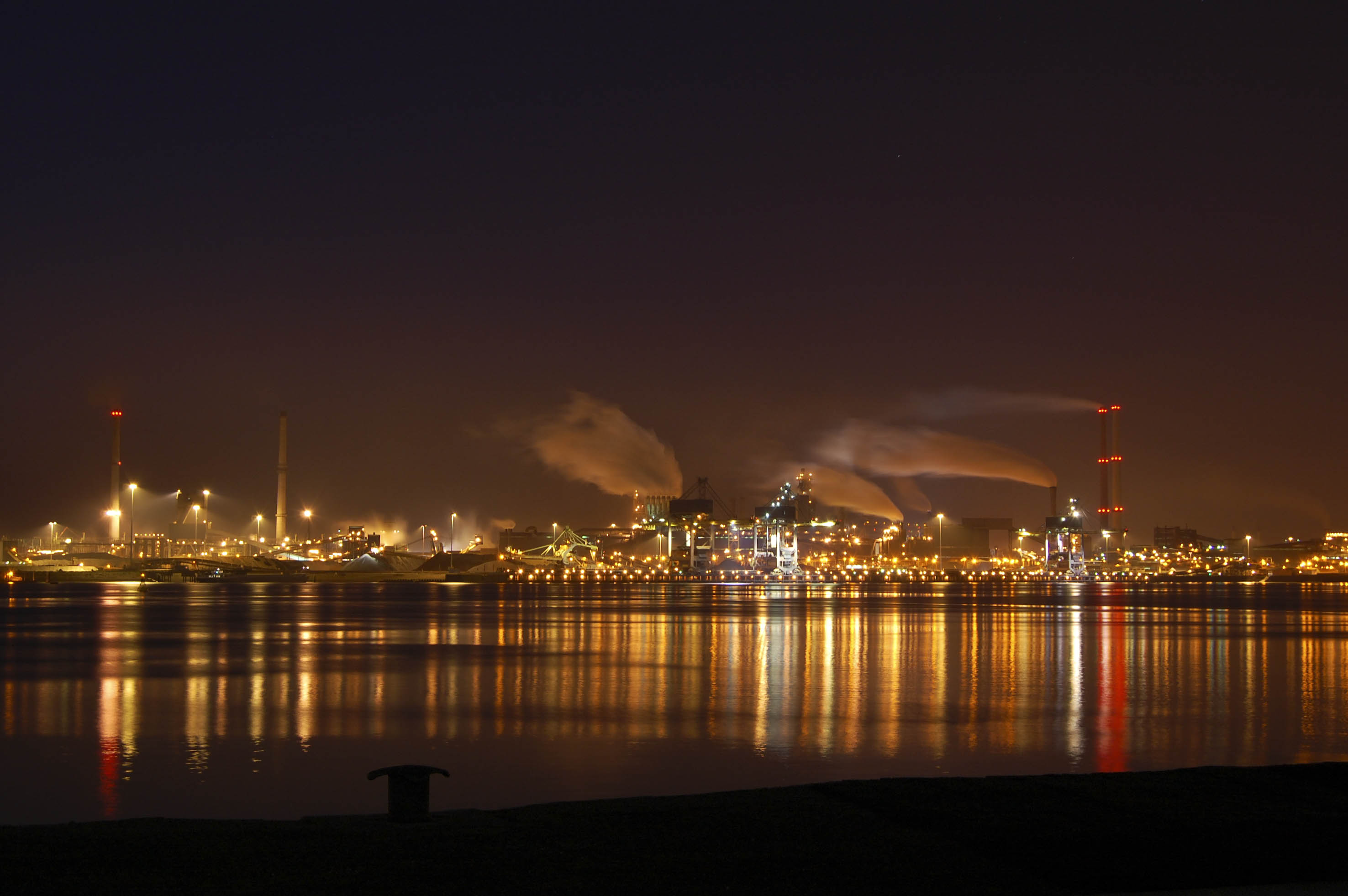 Night view of Noordzeekanaal from Ymuiden